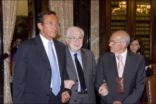 Il Presidente della Camera dei deputati, Gianfranco Fini, accompagna nella Sala della Lupa il Presidente Emerito della Repubblica, Francesco Cossiga